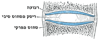 מפרק מסוג מאחה